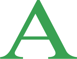 de|Logo von SV Arminia Hannover Neu (seit 2010)